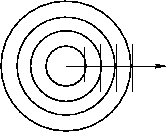 Schematische Darstellung der Ausbreitung einer Kugelwelle mit beispielhaft eingezeichnetem Strahlweg.